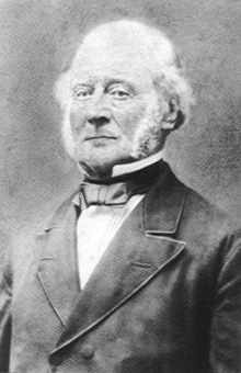 Panthaleon Gerhard Coenraad Hajenius (b. 1806 in Arnhem- d. 1889 in Amsterdam).